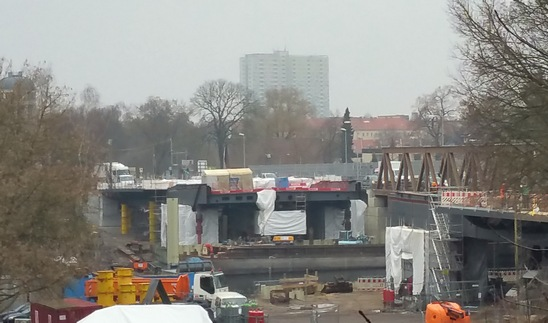 neue Freybrücke, Baustand 16.Dezember 2015: Vorbrücken stehen und werden mit Fahrbahndecken ausgestattet.